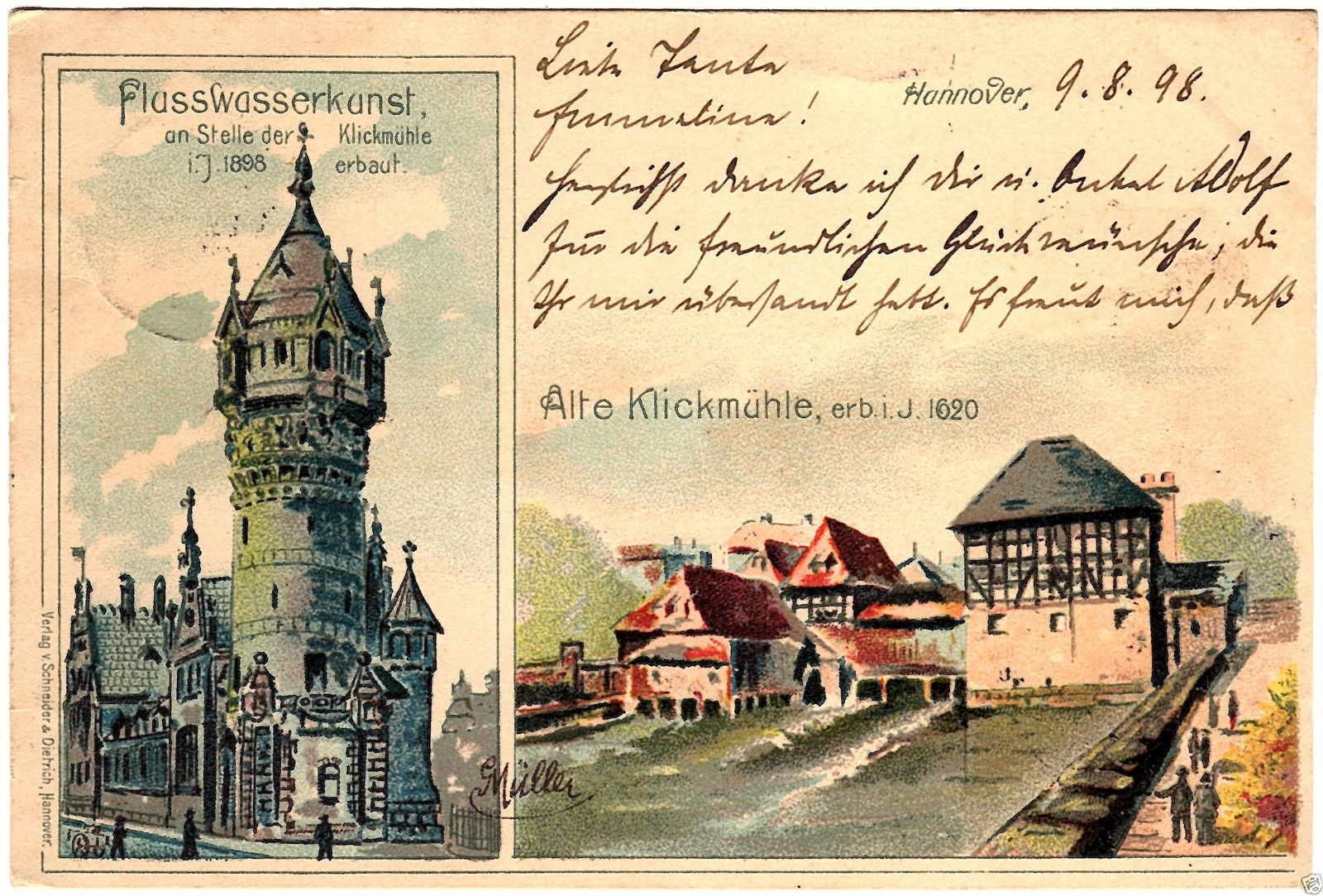 Um 1898 im Verlag Schneider & Dietrich in Hannover produzierte Ansichtskarte mit einer Vielfarb-Lithografie und der Künstlersignatur von George Müller. Neben dem Textfeld, handschriftlich mit einem Dank an die Tante Emmeline Lodde-Dodel und Onkel Adolf ausgefüllt, findet sich links die seltene Abbildung des Turmes der Flusswasserkunst aus der Blickrichtung der Markthalle, rechts daneben die Darstellung der altenim Jahr 1620 erbauten Klickmühle, Vorläuferin des später auf Veranlassung des hannoverschen Stadtbaurates Rudolf Hillebrecht abgerissenen Flusswasserkunst ...